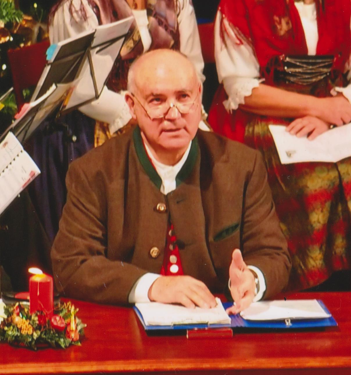 Weihnachtslesung Parktheater im Kurhaus Göggingen Dez. 2011